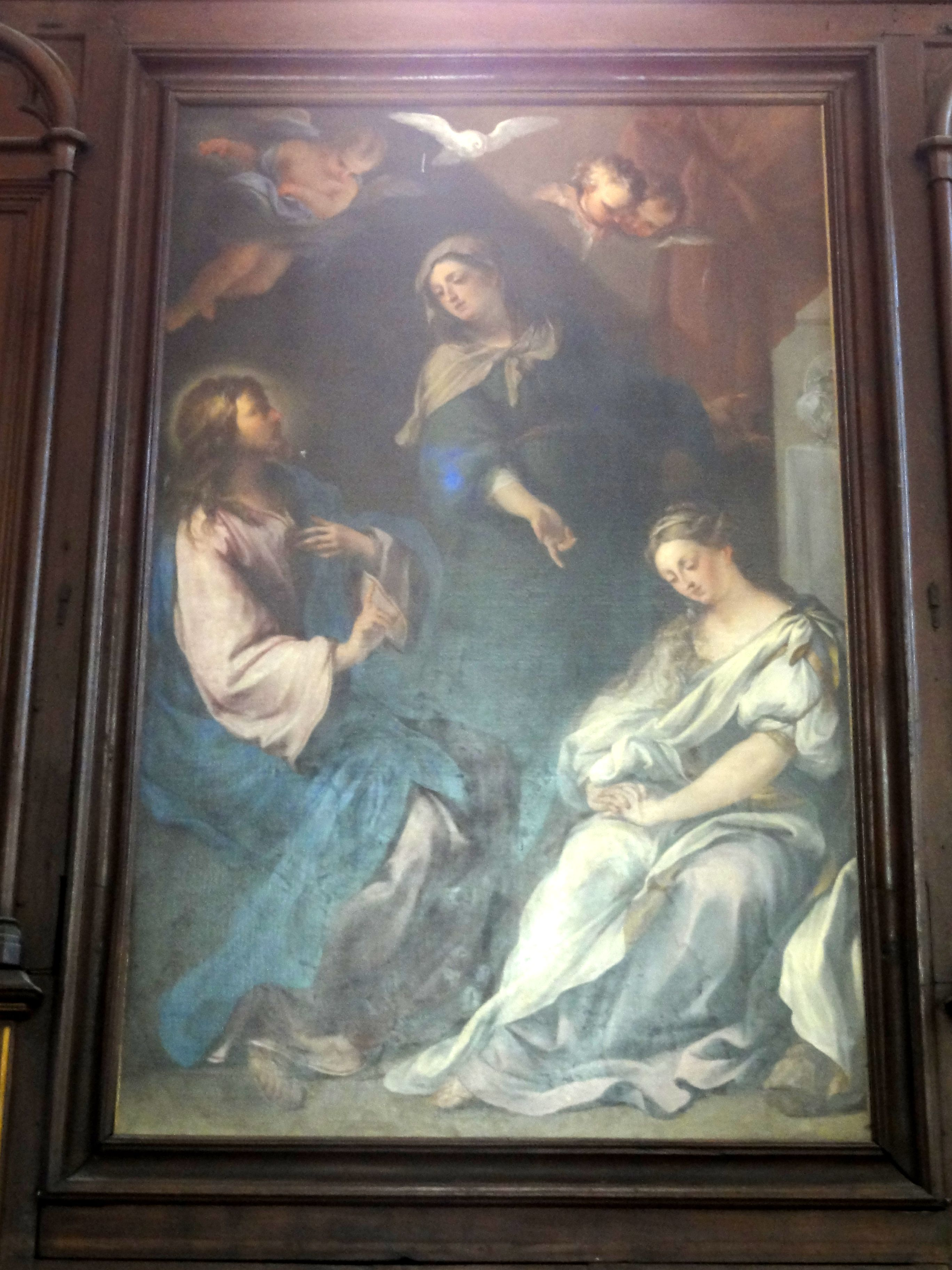 Tableau - Jésus chez Marthe et Marie.